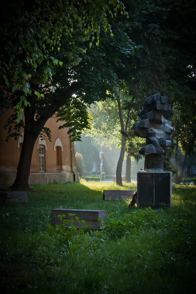 timisoara - parc Castelul Huniazilor